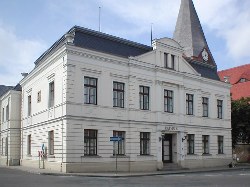 Rathaus in Neukalen, Mecklenburg-Vorpommern, Deutschland